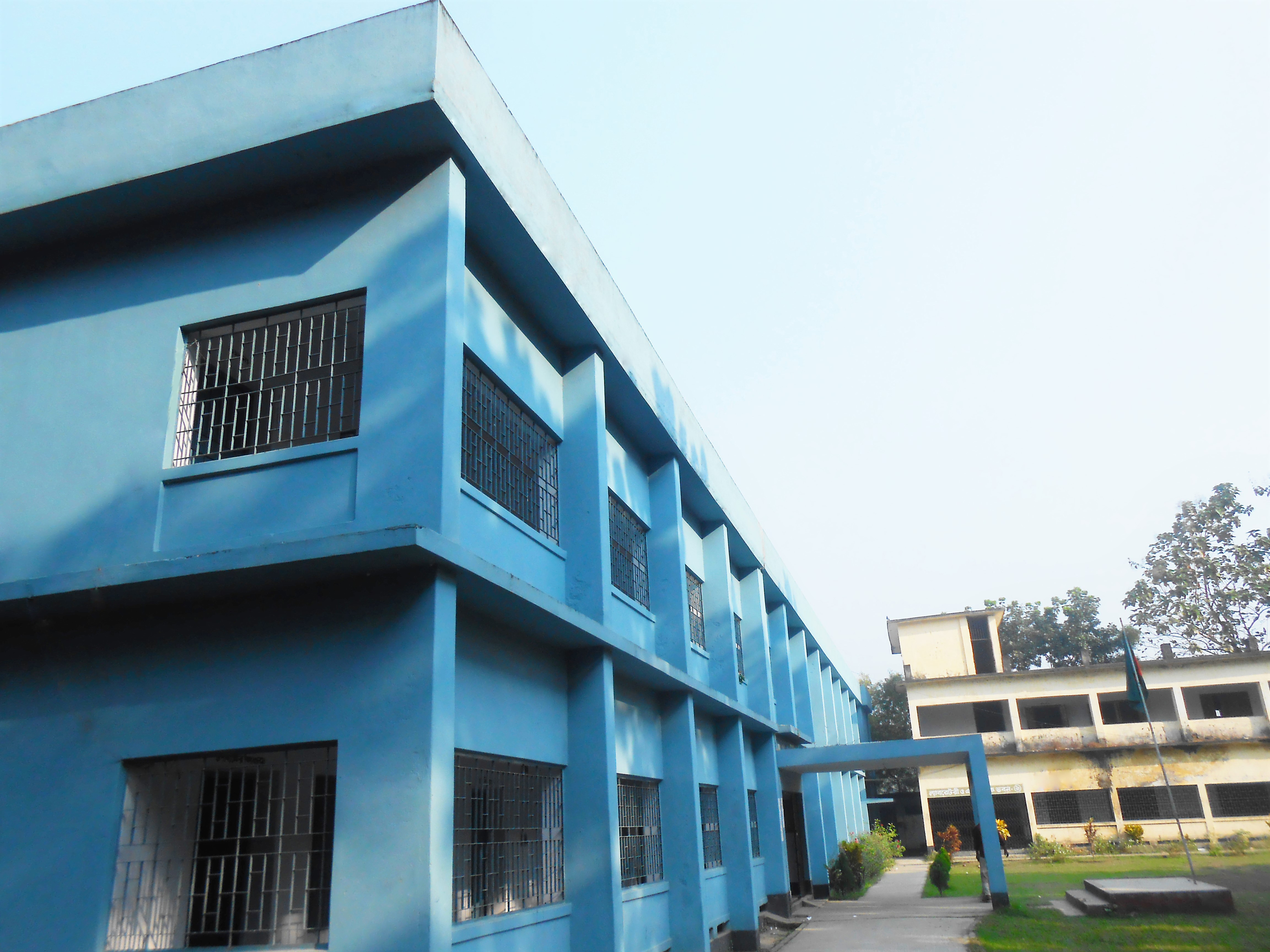 সরিষাবাড়ী অনার্স কলেজ